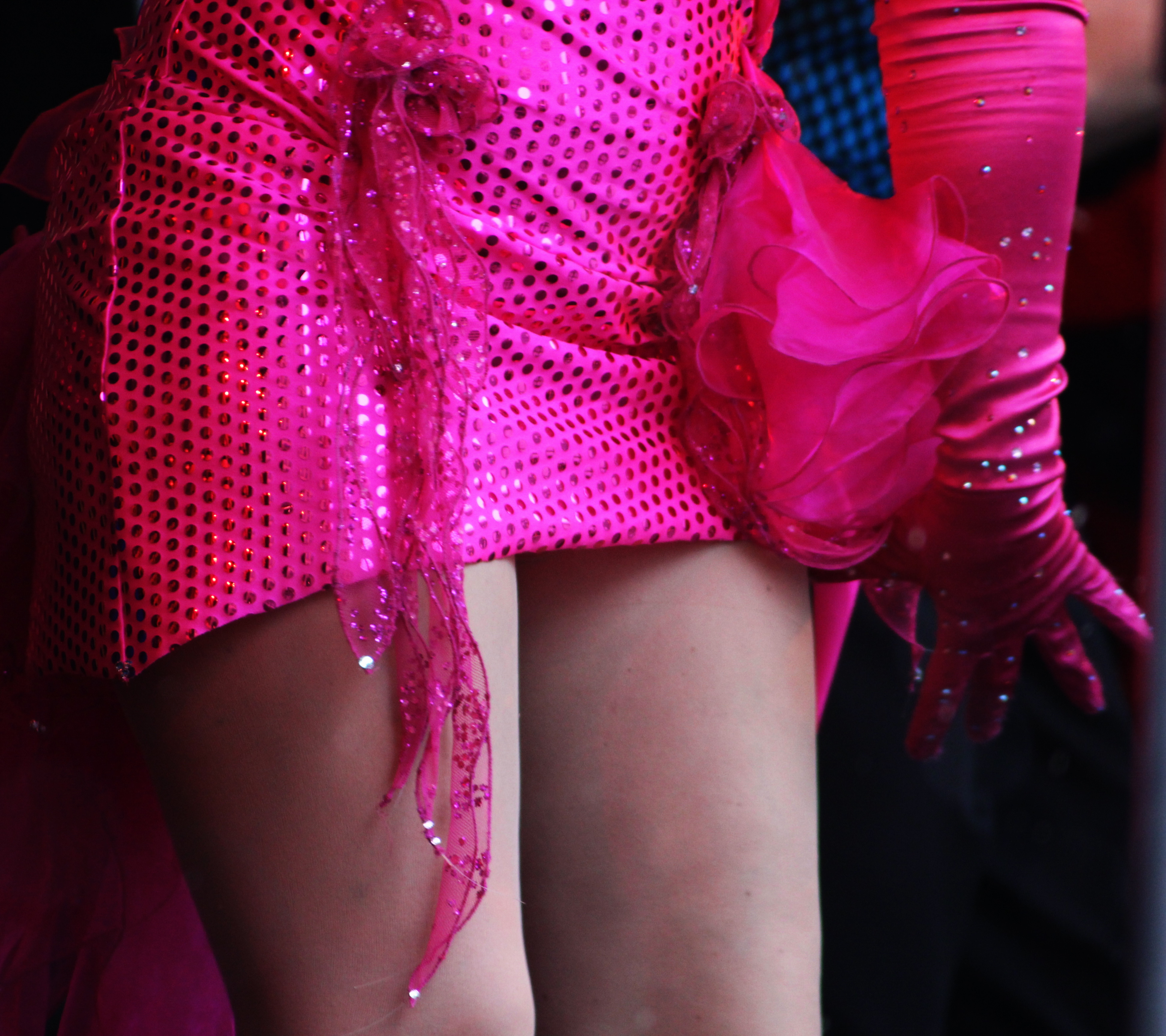 Fasching in München. Rosa Handschuhe und kurzes Kleid.